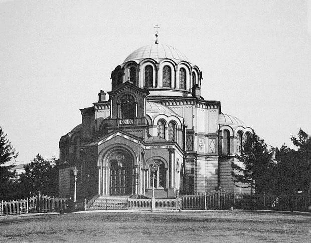 Греческая церковь на Греческой площади. Историческое фото